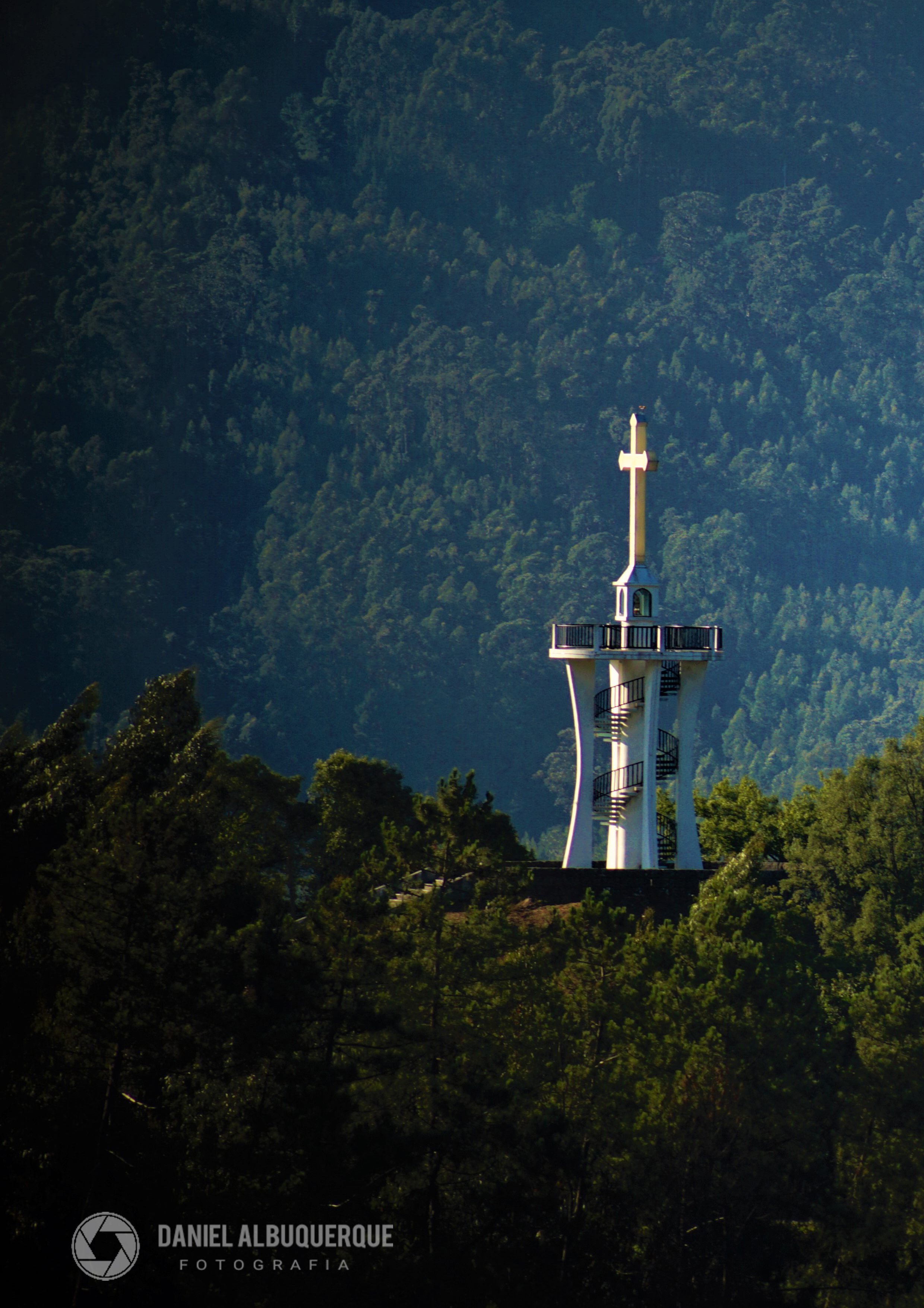 Fotografia: Daniel Albuquerque